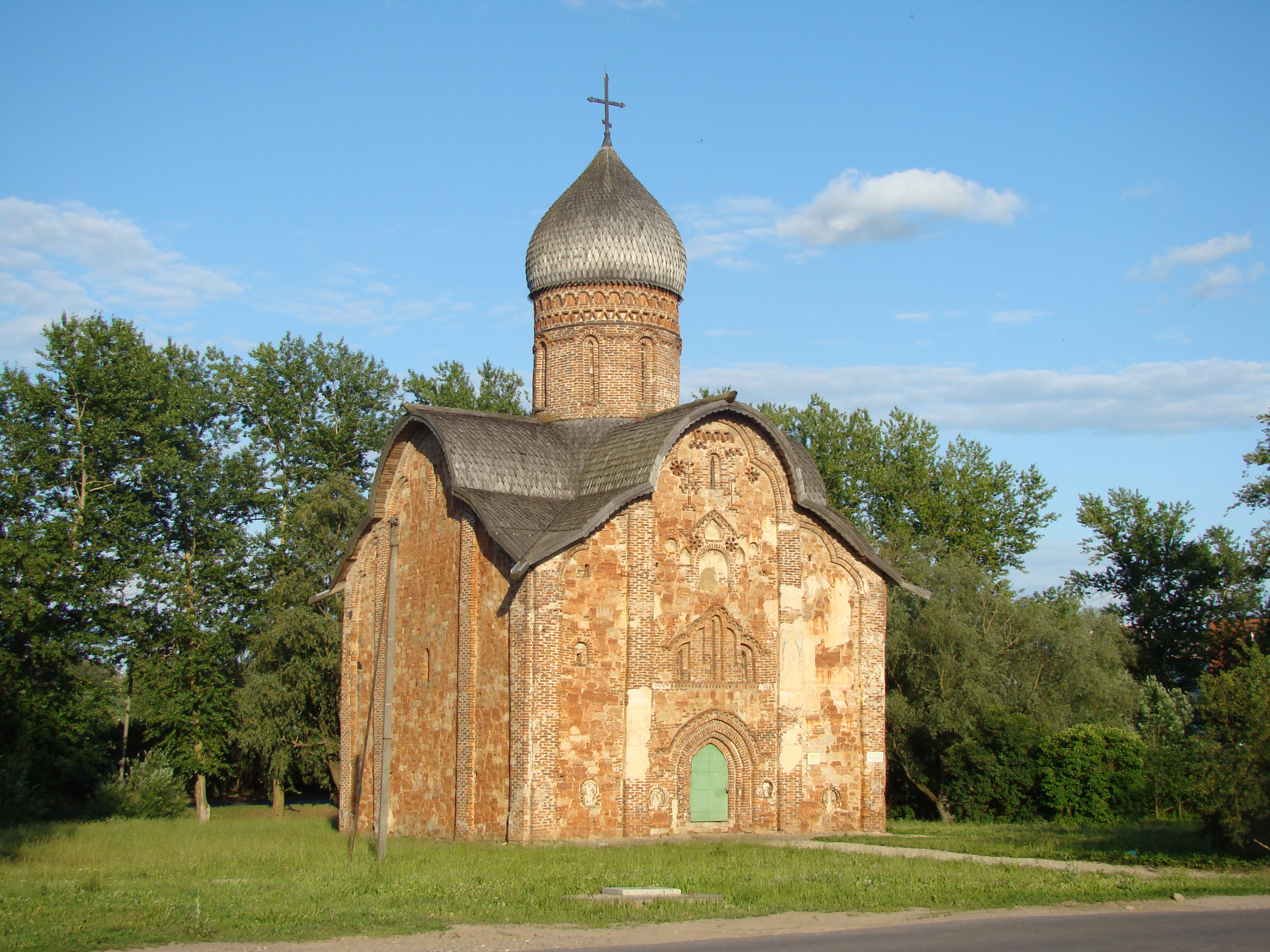 Church of St Peter and Paul in Kozhevniki, Veliky Novgorod